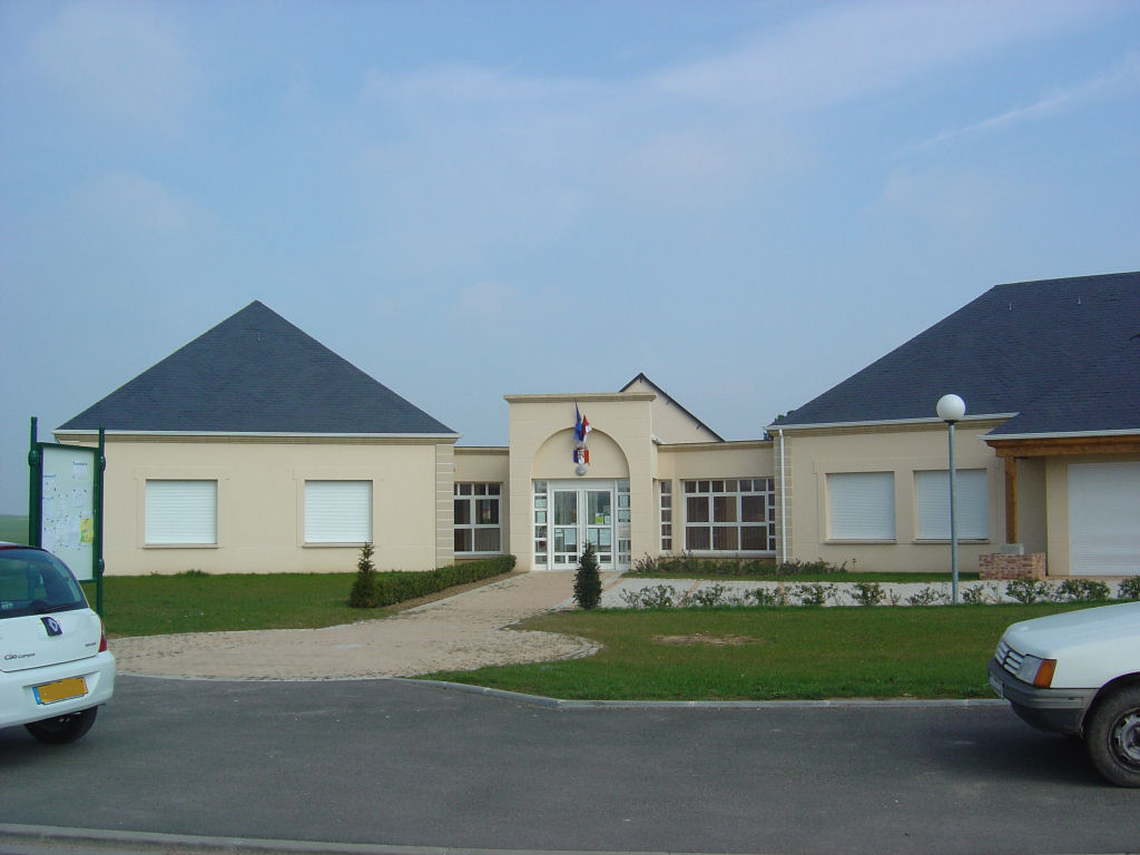 Entree principale nouvelle Mairie d'Angerville-la-Campagne (27 Eure France -Normandie)